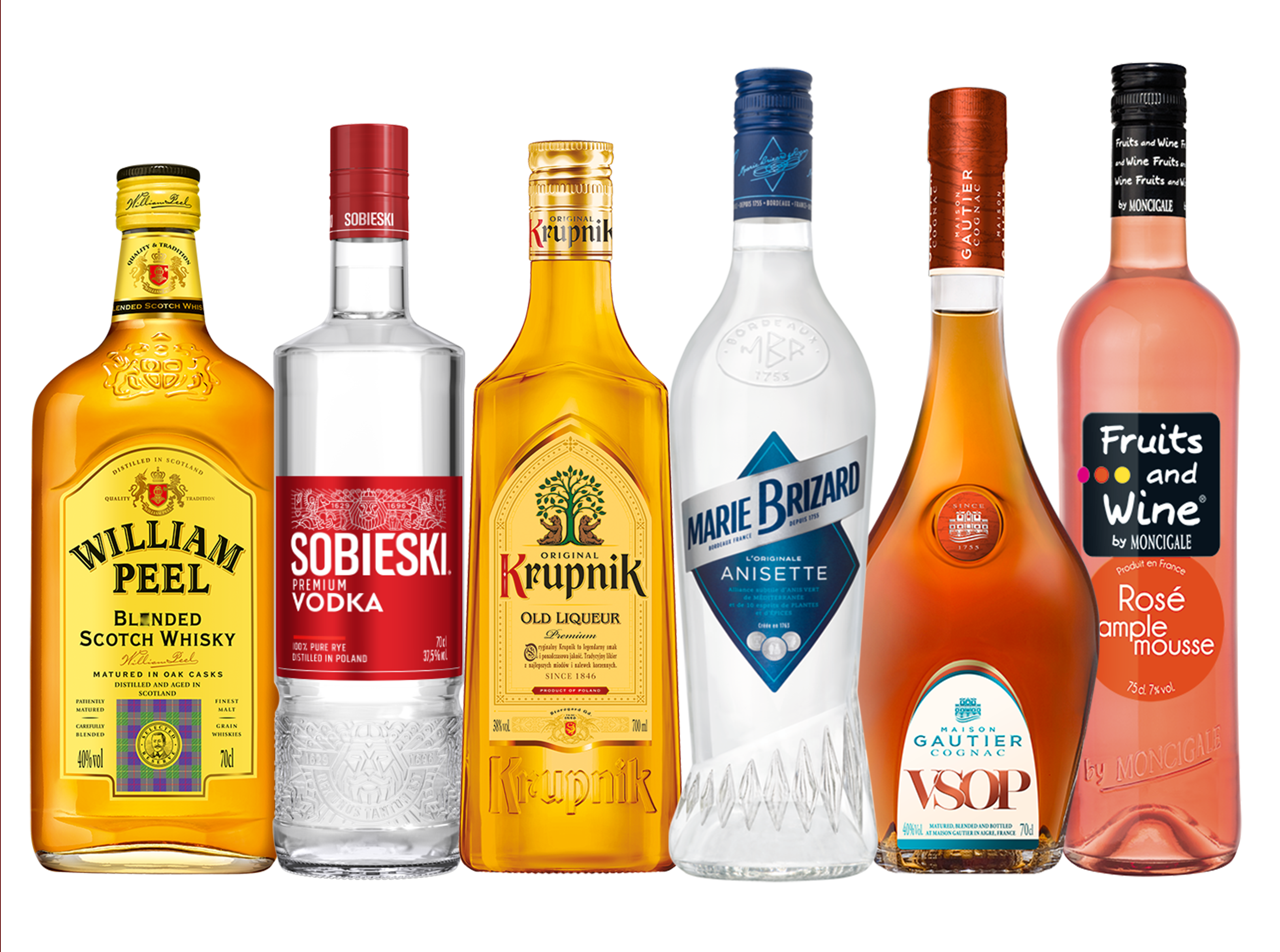 Bouteilles des principales marques du groupe Marie Brizard Wine & Spirits